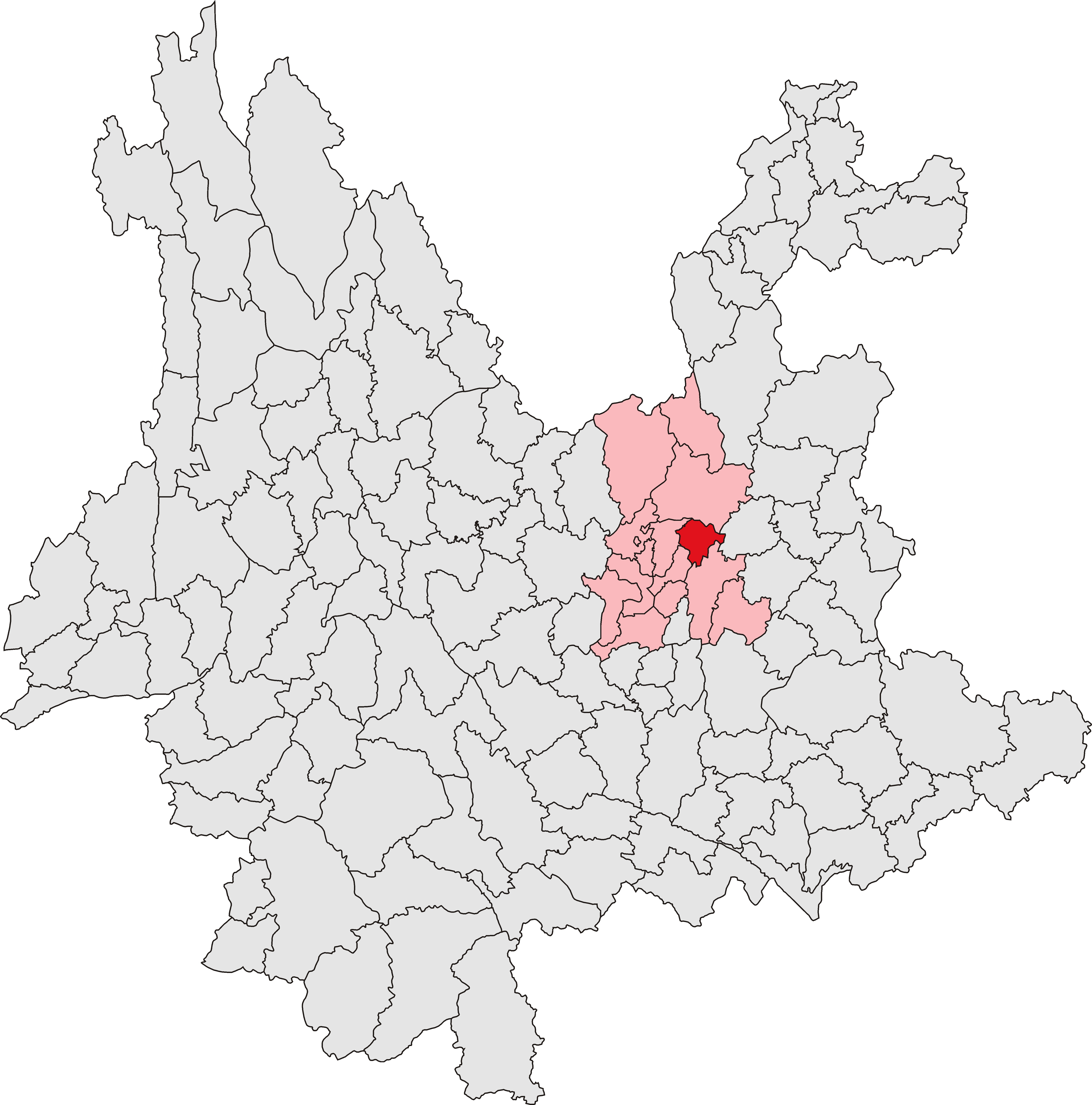 中文（中国大陆）: 嵩明县位置图